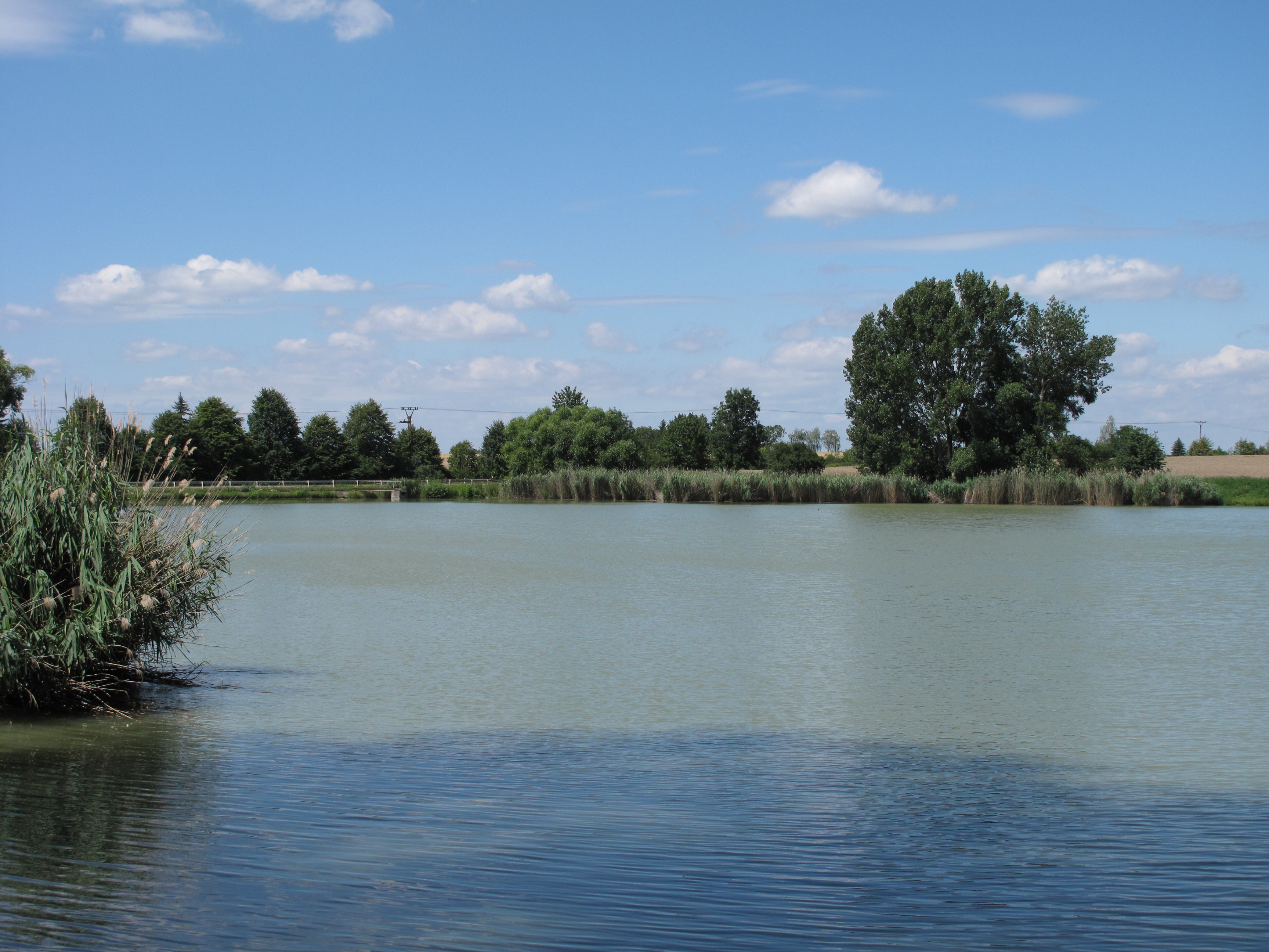 Štítarský potok. Česká republika.